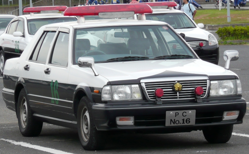 全国白バイ安全運転競技大会にて撮影。